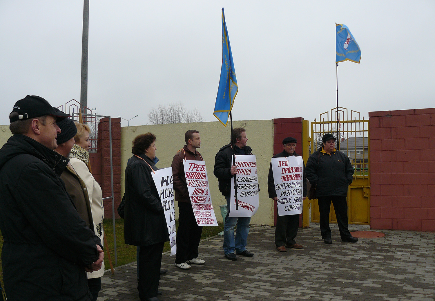 Пікет на стадыёне "Будаўнік"